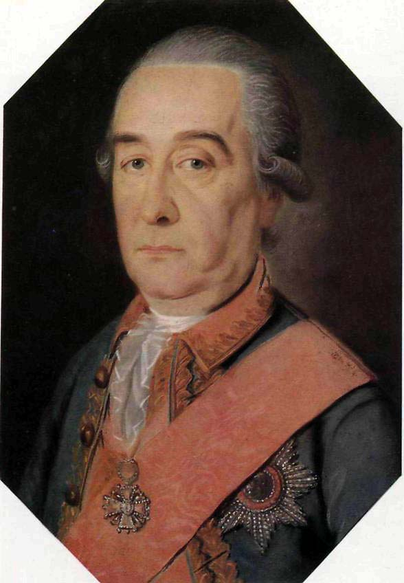 Неизвестный художник. Портрет генерал-поручика М. М. Измайлова. Вторая половина XVIII в.